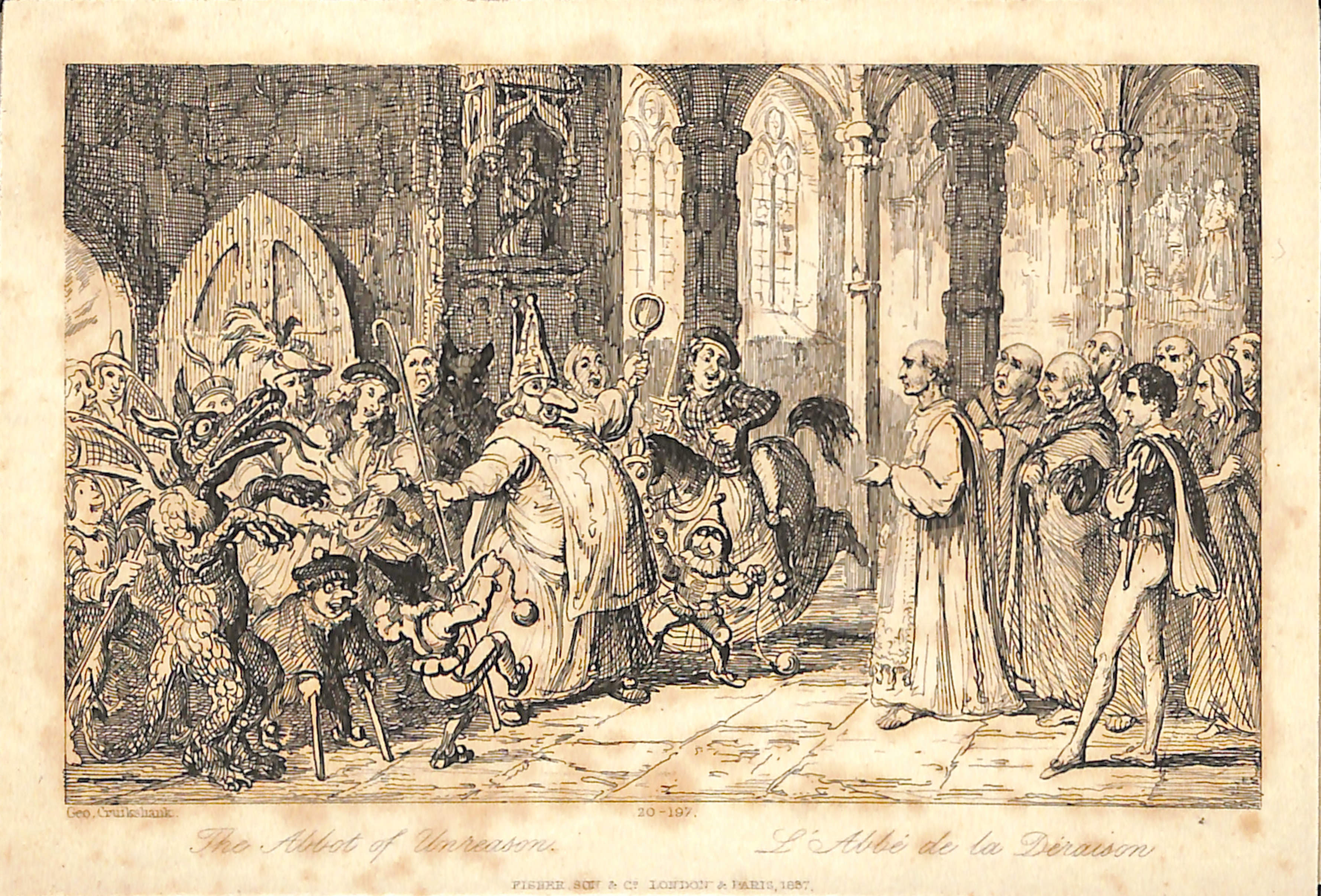 Mascarade exécutée pendant le Temps de Noël